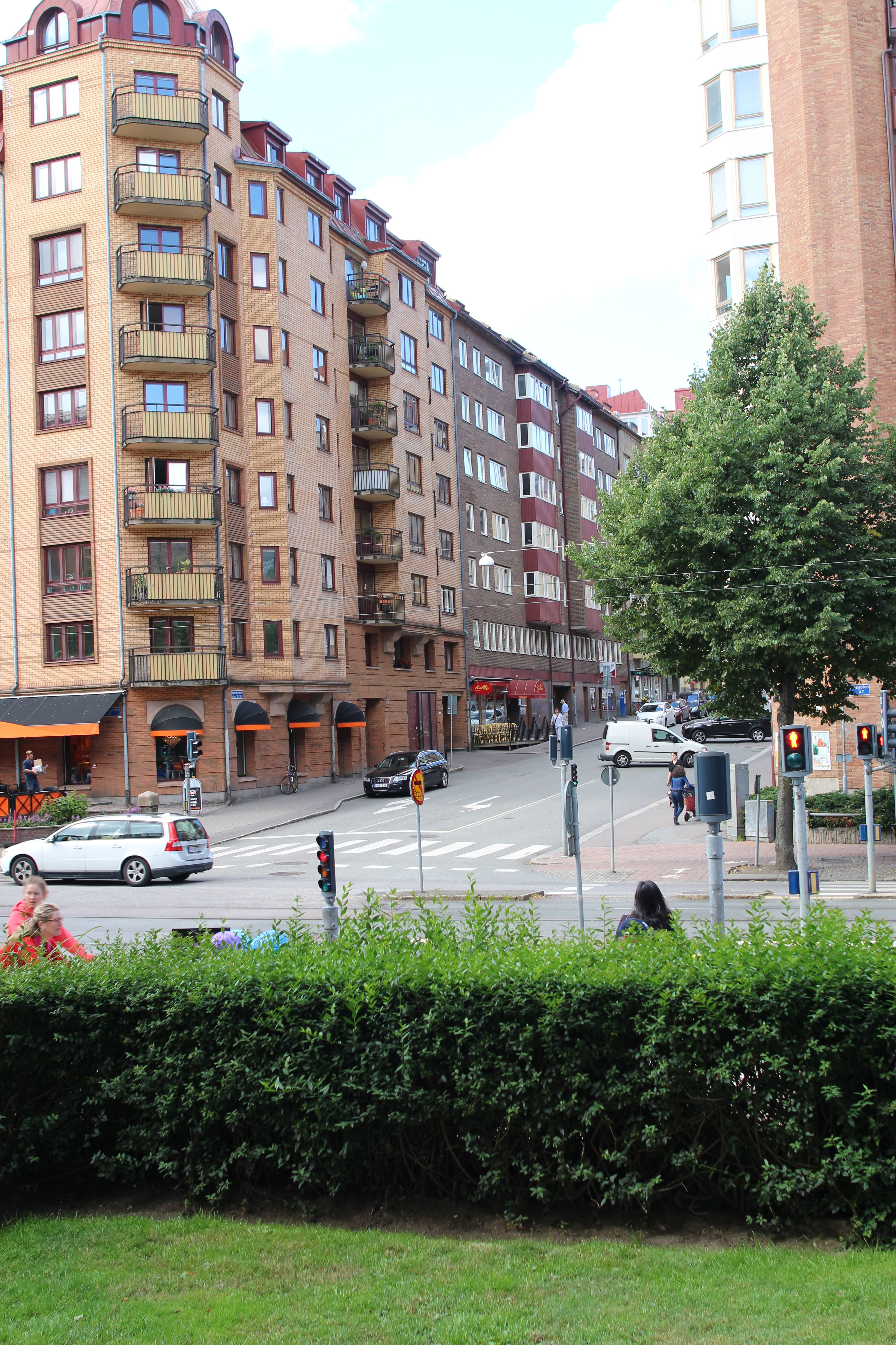 Korsningen mellan Nordenskiöldsgatan och Linnégatan. Linnégatan är gatan som löper horisontellt i bilden.